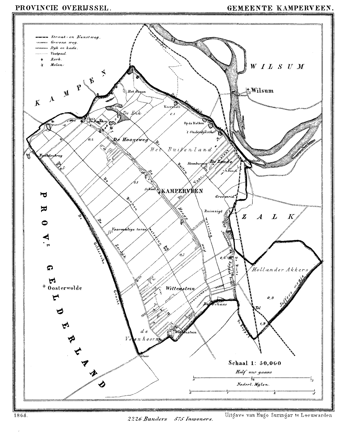 Een oude kaart van Kamperveen. Te oud voor auteursrecht, 1858.